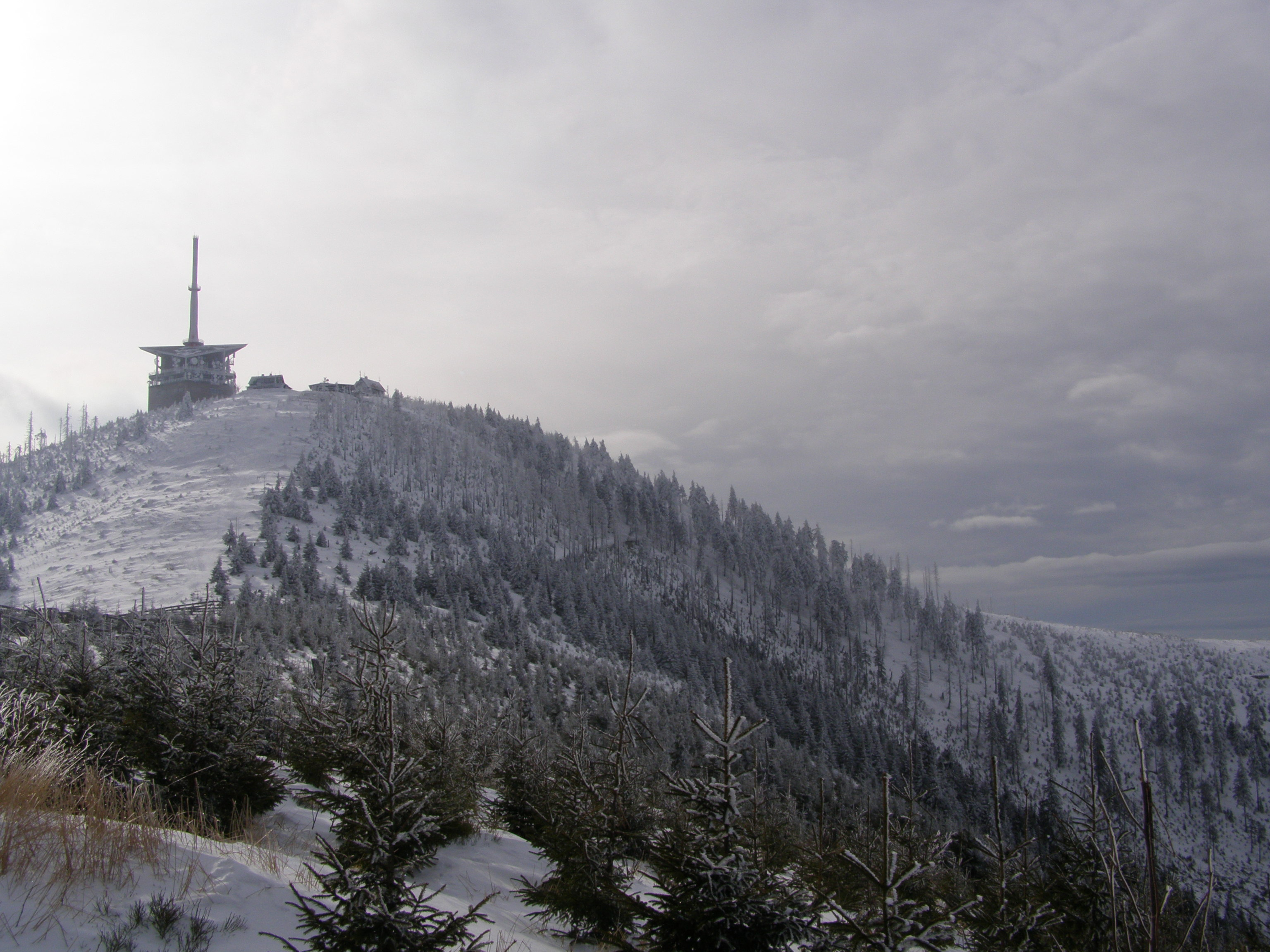 Moravskoslezské Beskydy, Lysá hora, vrchol